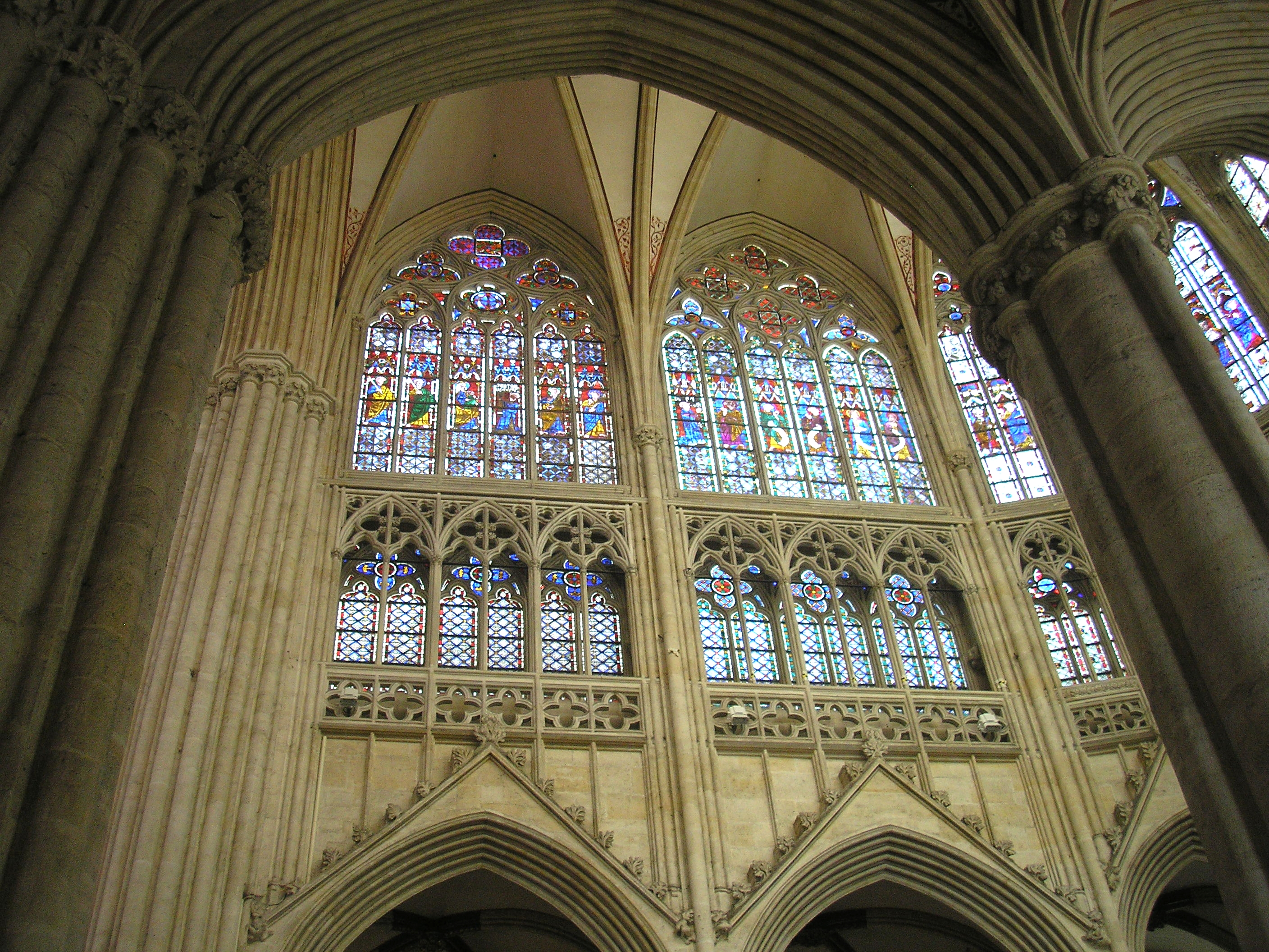 Sées (Normandie, France). Travées dans la cathédrale Notre-Dame.